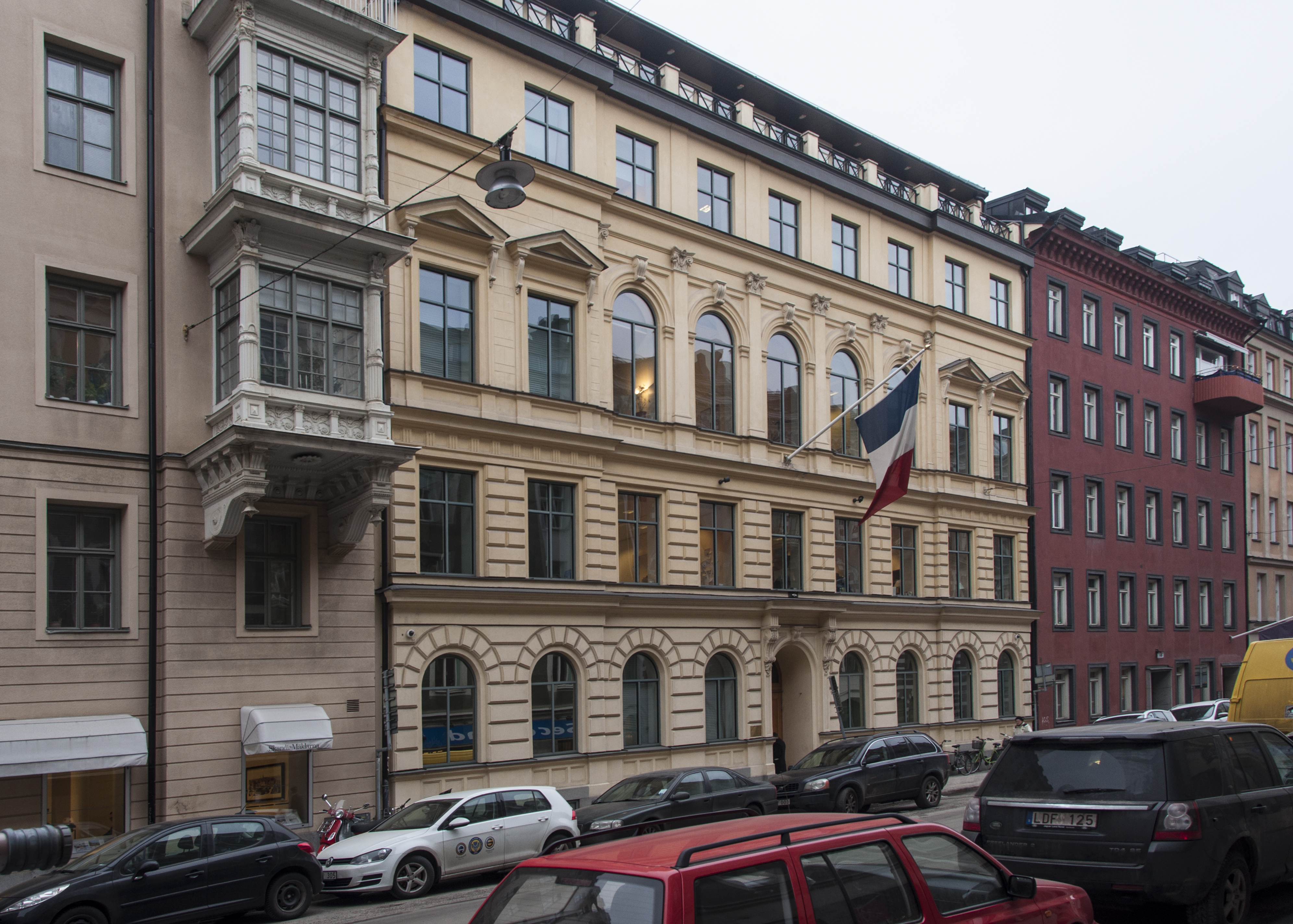 Flundran 10, Kommendörsgatan 13, Nybyggnadsår 1882. Arkitekt Carl Sandahl Ursprungligen Ladugårdslands högre läroanstalt för flickor, sedermera Lyceum för flickor och Palmgrenska samskolan. Därefter Frankrikes ambassad